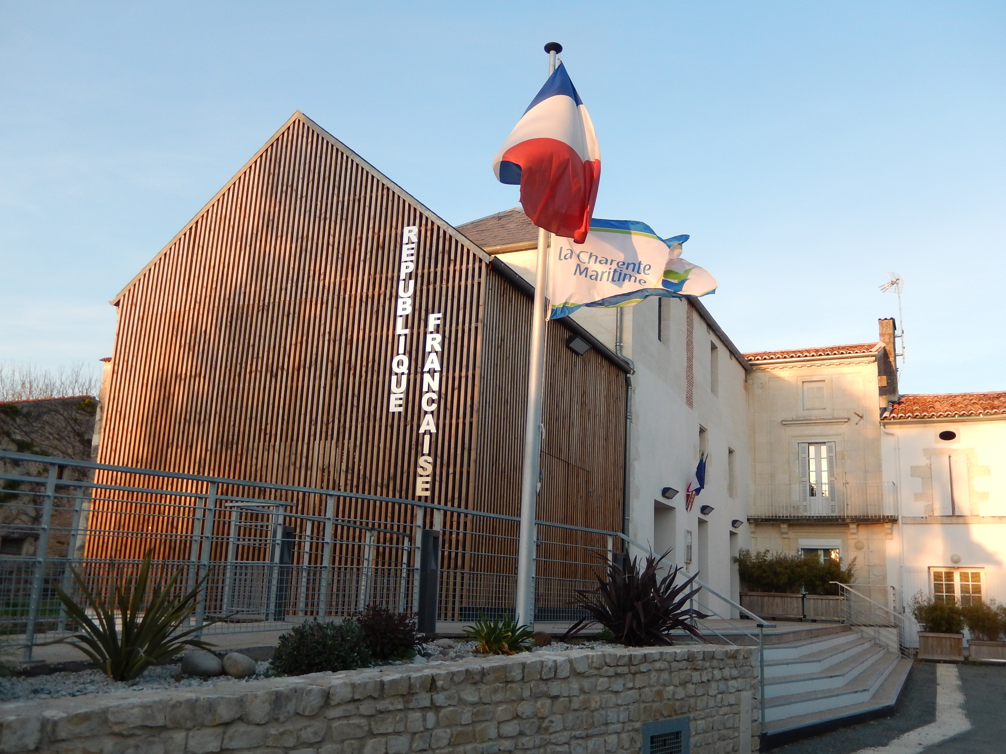 La nouvelle mairie d'Annepont, installée dans le bâtiment du moulin à eau depuis l'achèvement de sa rénovation en juillet 2016.